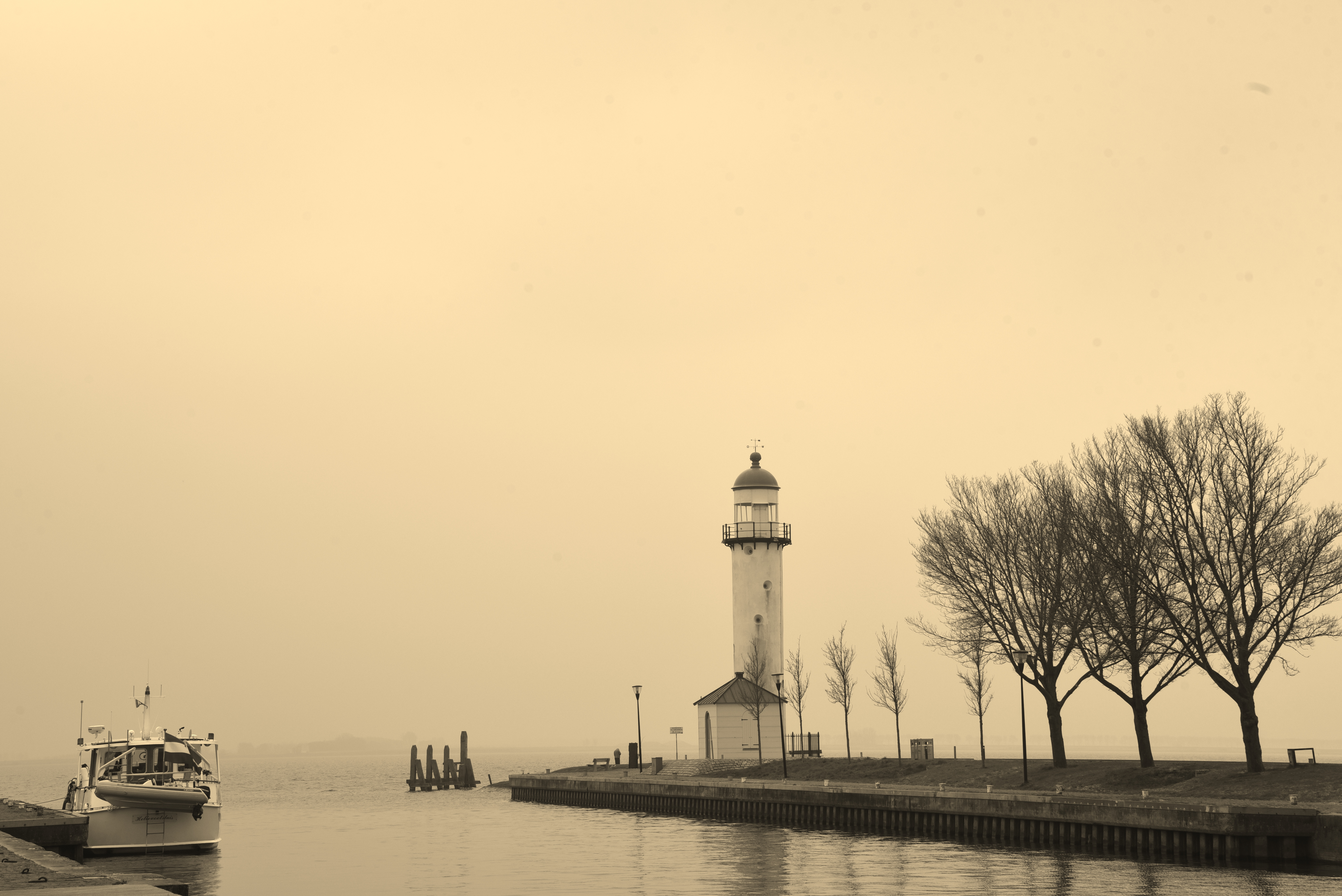 Leuchtturm Hellevoetsluis